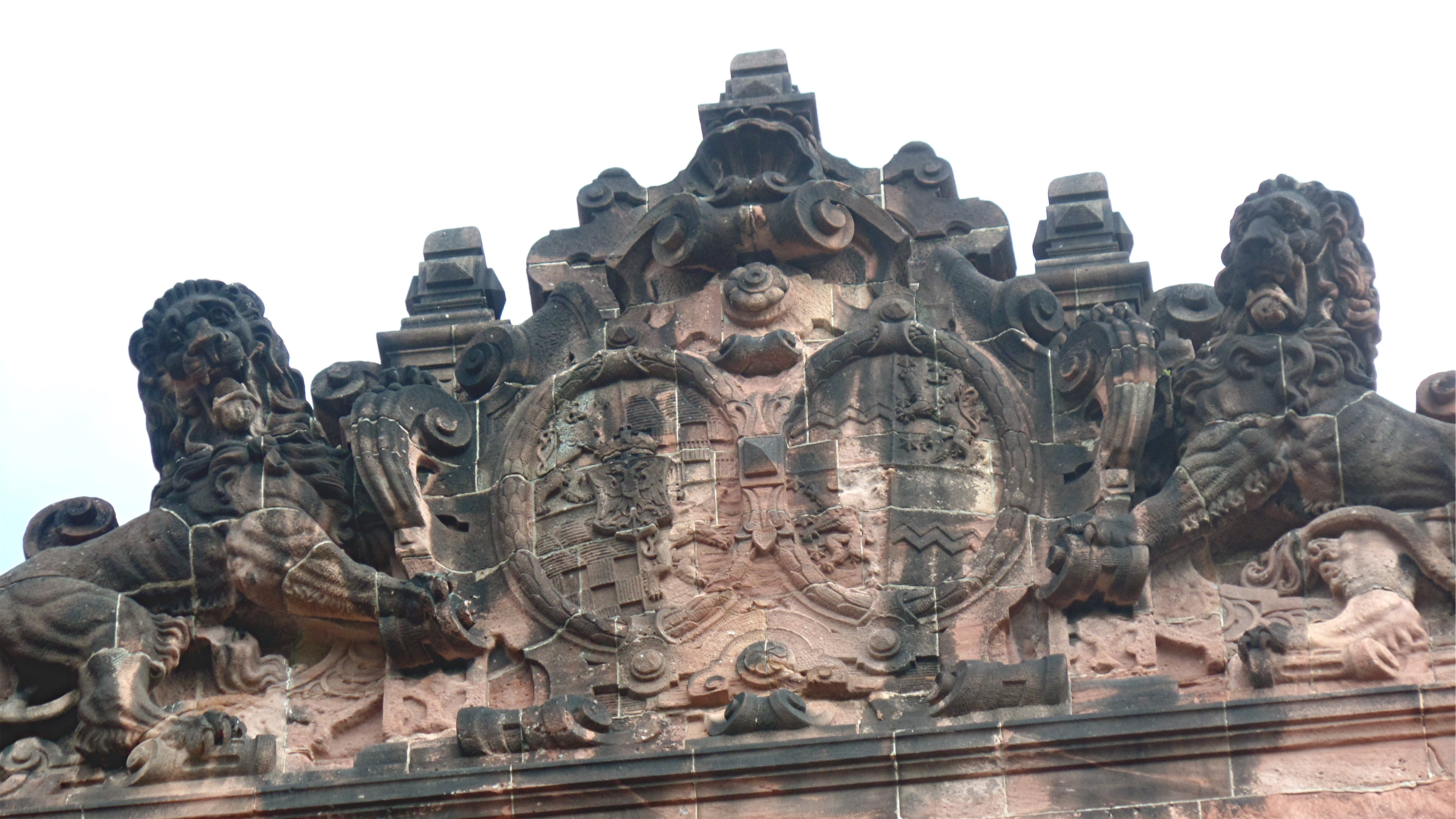 Wappen an der Westseite